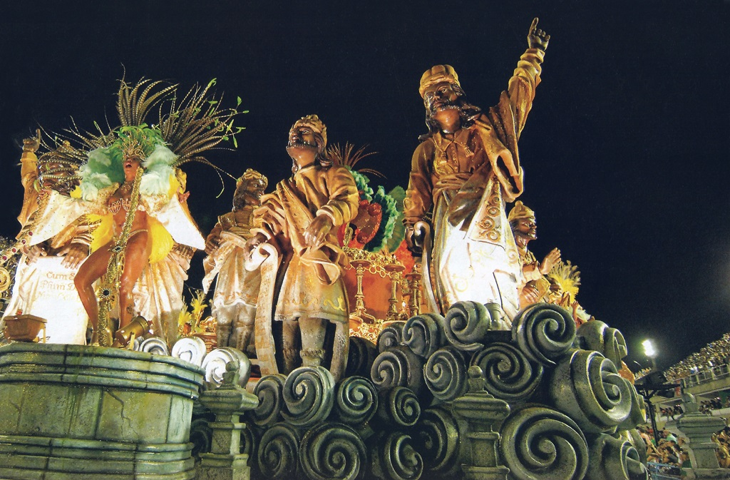 Desfile das Escolas de Samba do Rio de Janeiro, 19 de fevereiro de 2007.